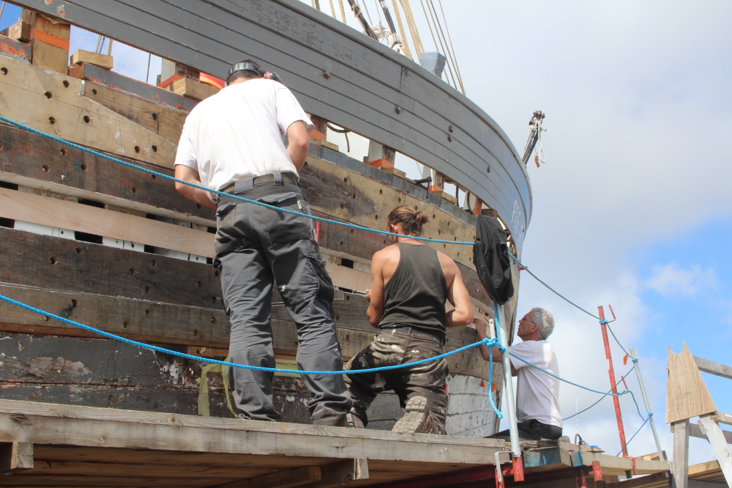 Des charpentiers de marine bois interviennent sur la "Fée de l'Aulne" pour quelques réparations avant sa mise à l'eau le 13 juillet, pendant les fêtes maritimes "Tonnerres de Brest 2012".